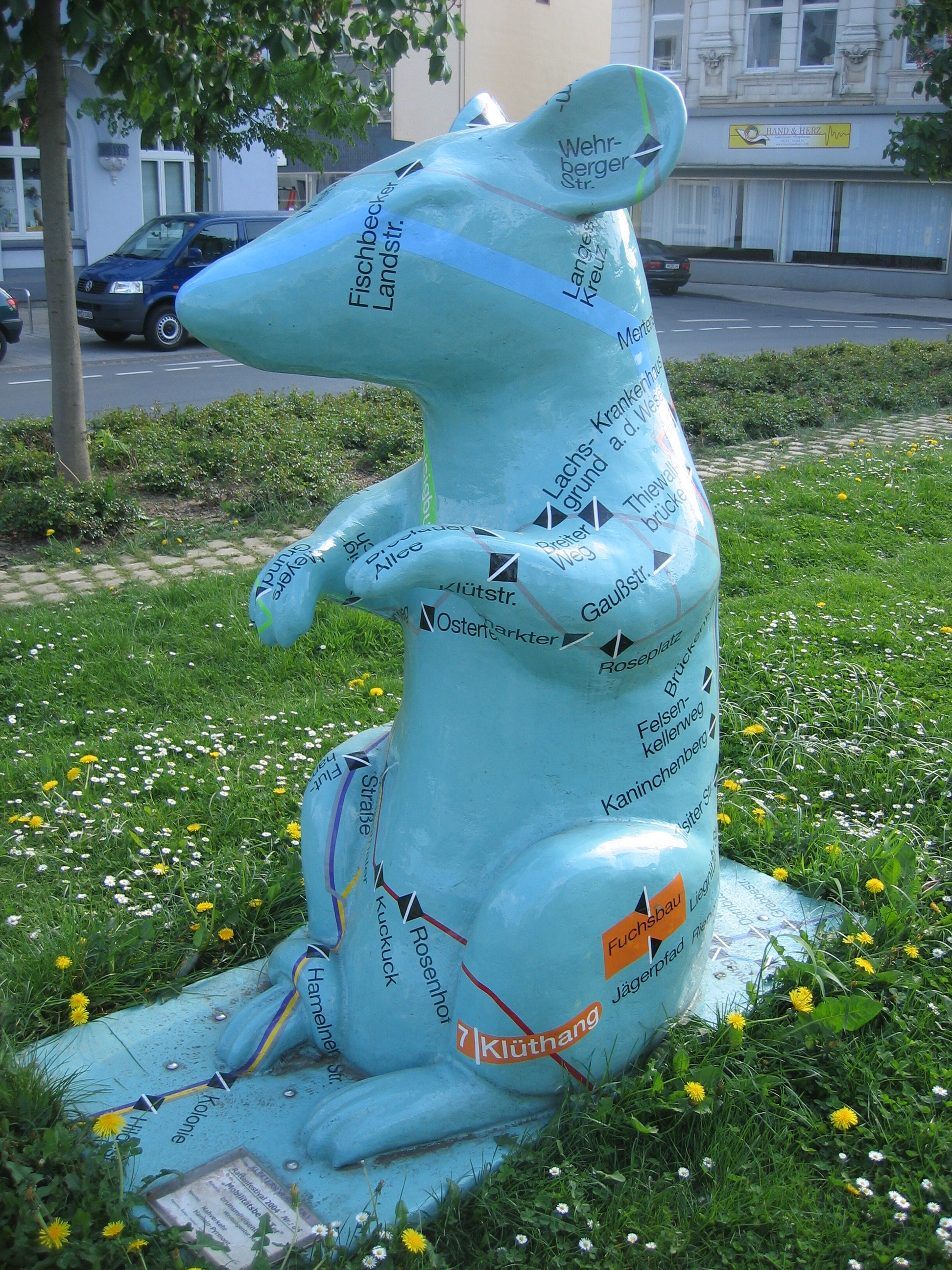 Der „MobilitätsbeRATer“ vor dem Bahnhof in Hameln